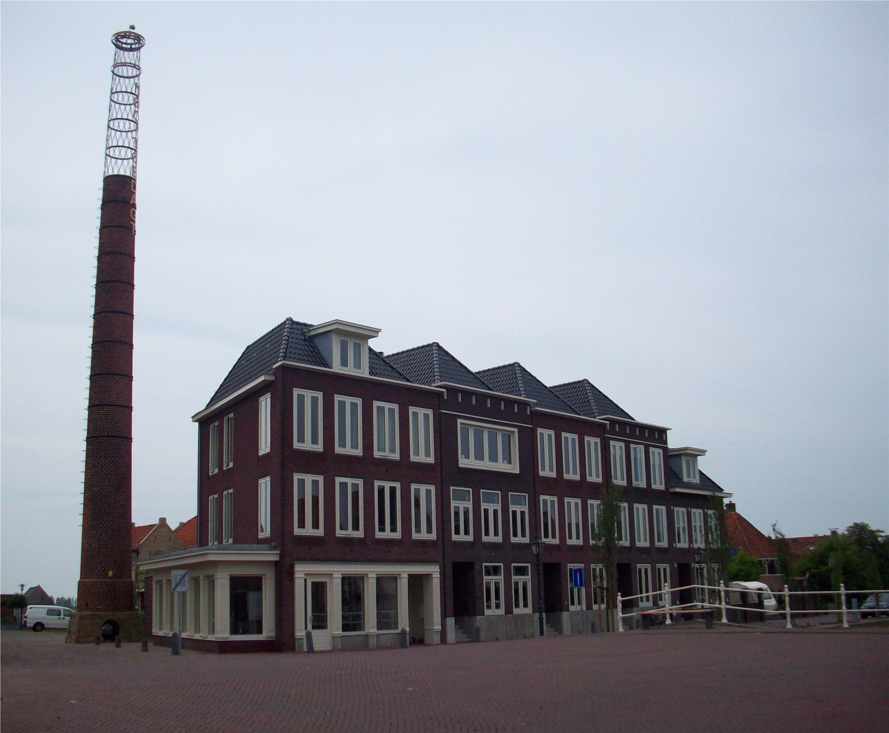 IJlst